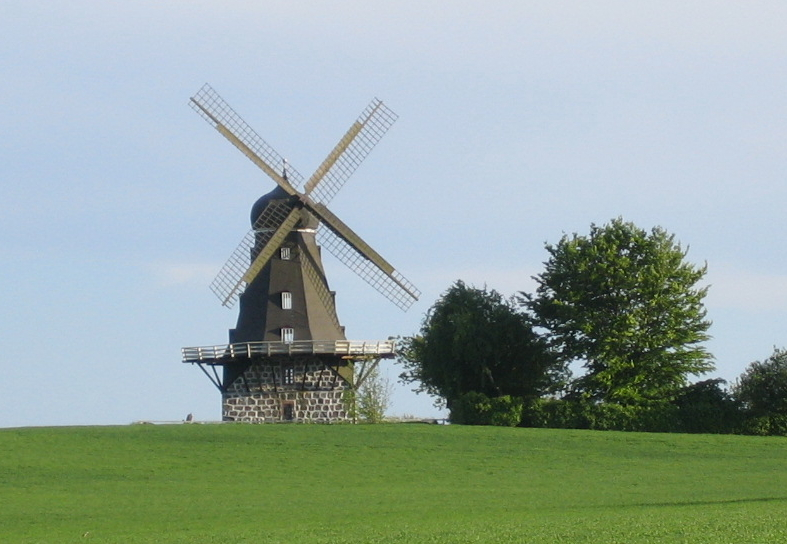 Aggarps Kvarn Svedala / Aggarp windmill in Svedala, Sweden